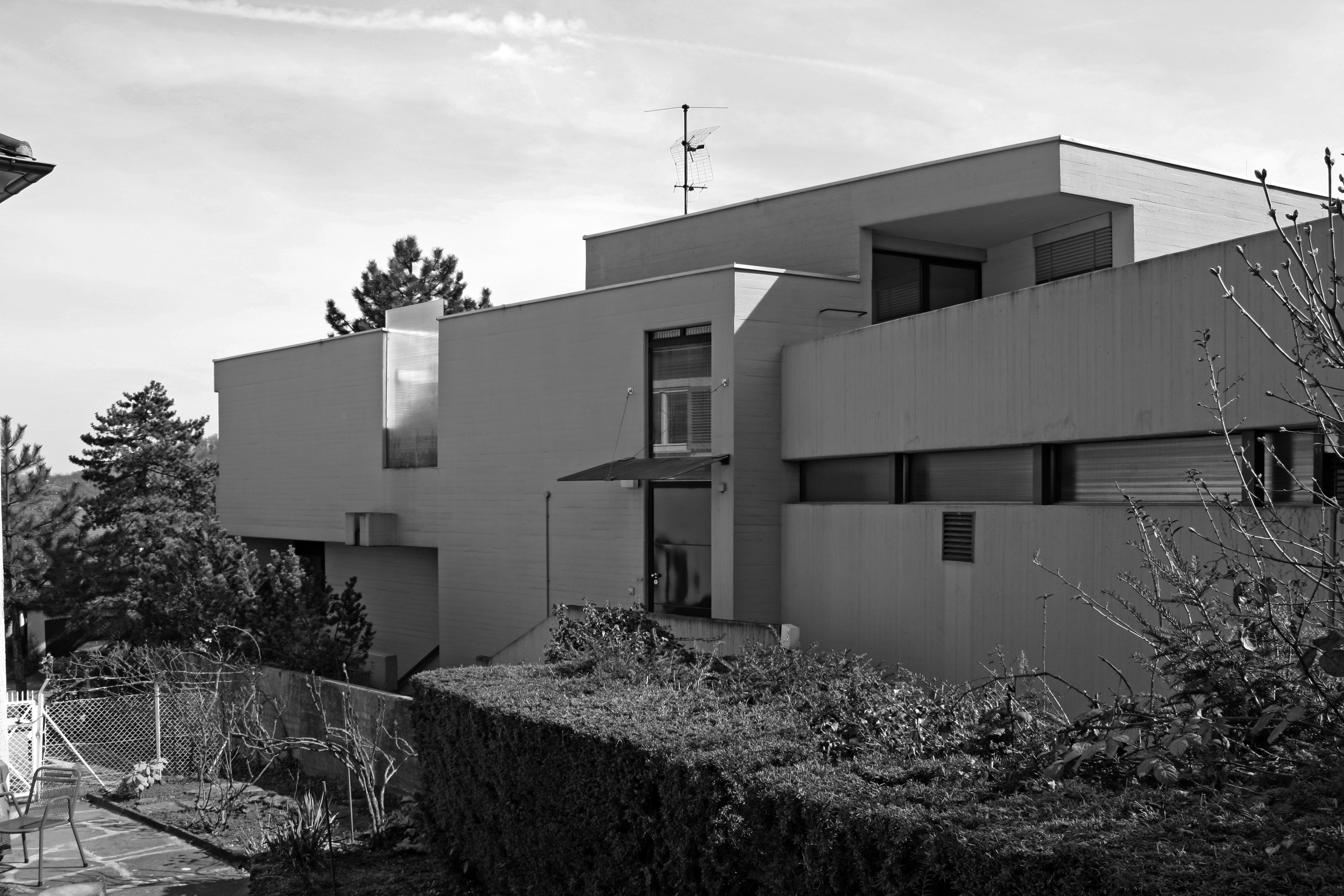 Wilfried Beck-Erlang: Haus Beck-Erlang in Stuttgart, 1964-66 (Rückseite)